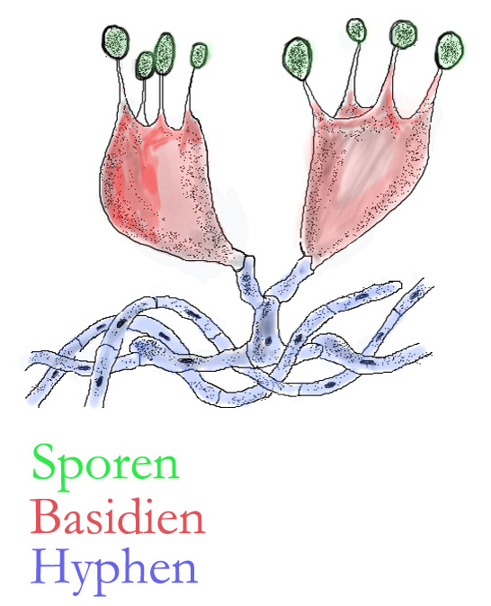 Zeichnung einer Basidie.